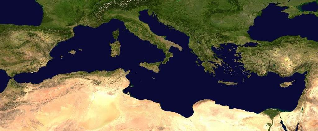 Karte des Mittelmeeres